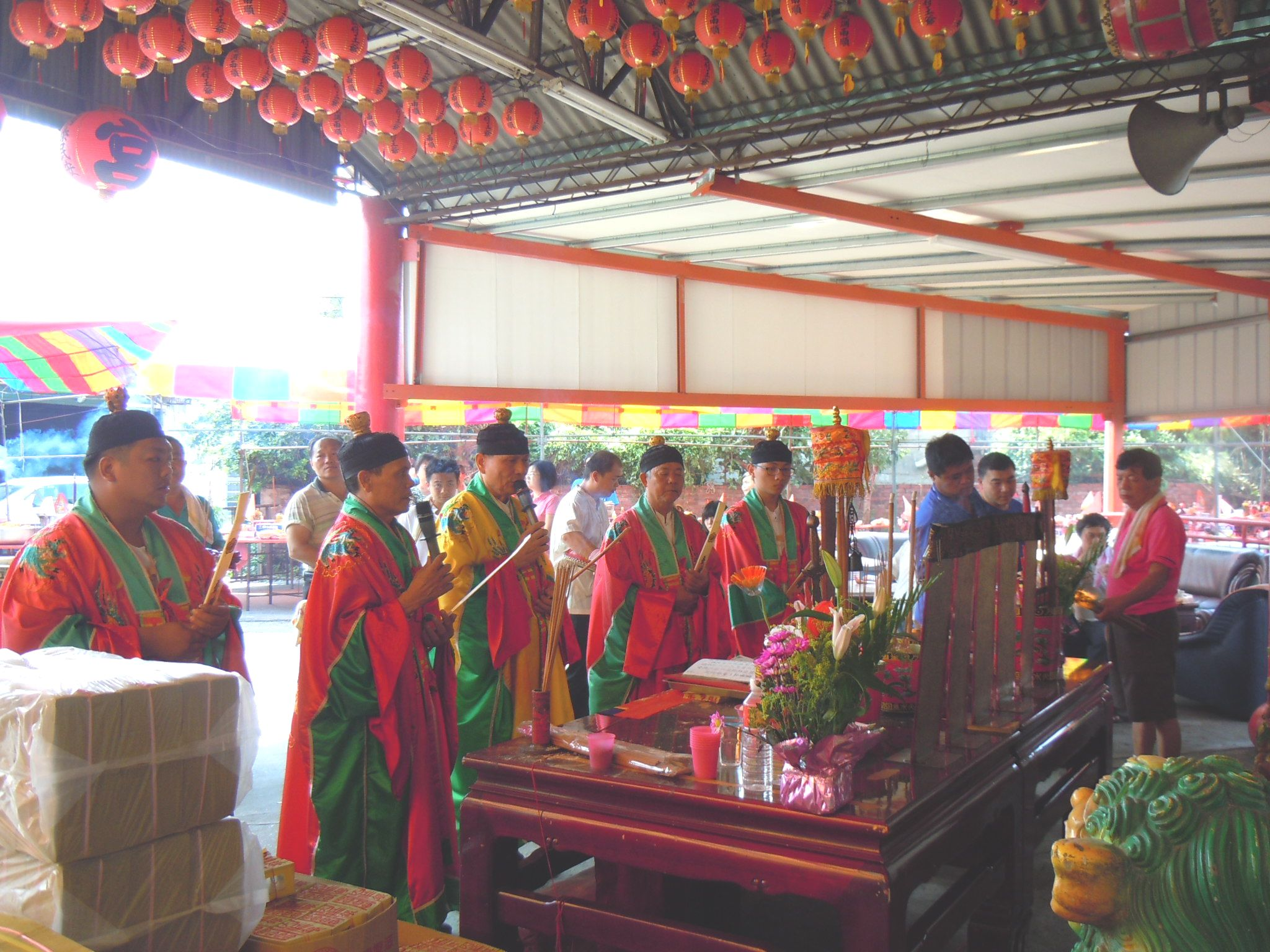 臺中市西屯區何安里何厝街119號－臺中靈安壇。